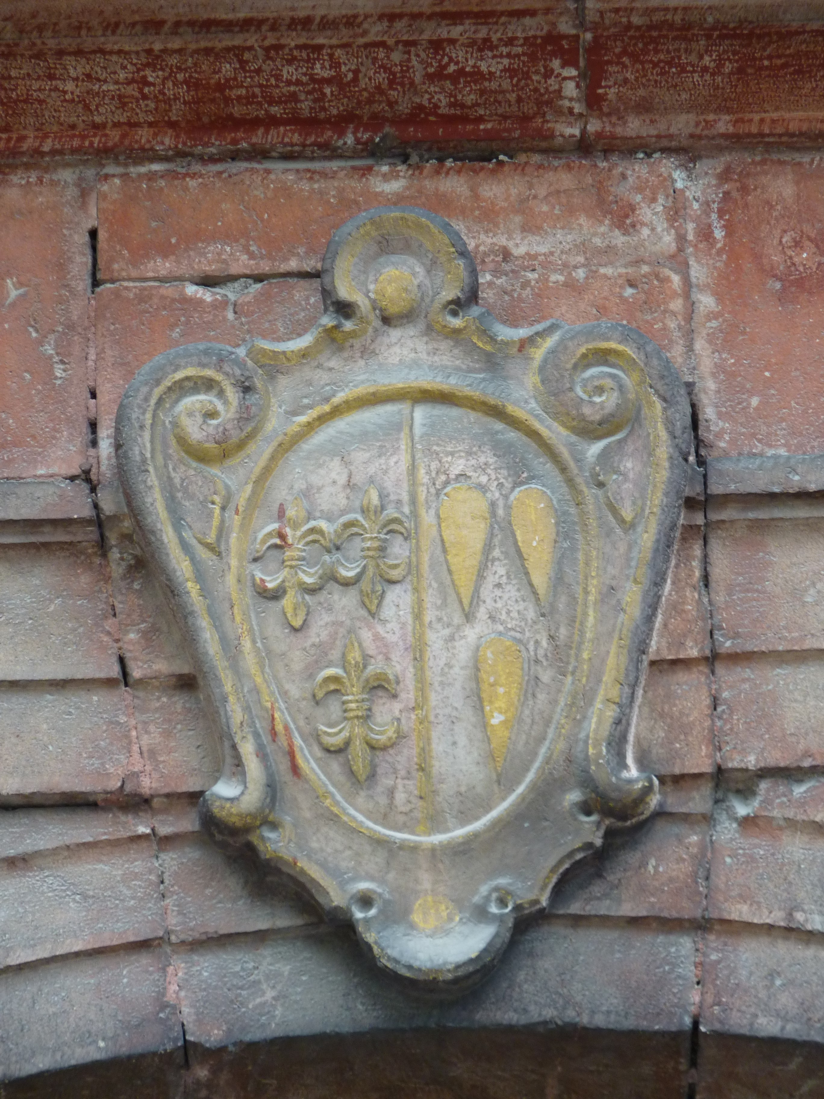 Stift Lilienfeld, Niederösterreich - Wappen von Abt Ignatius Kraft über dem Portal des Südtrakts